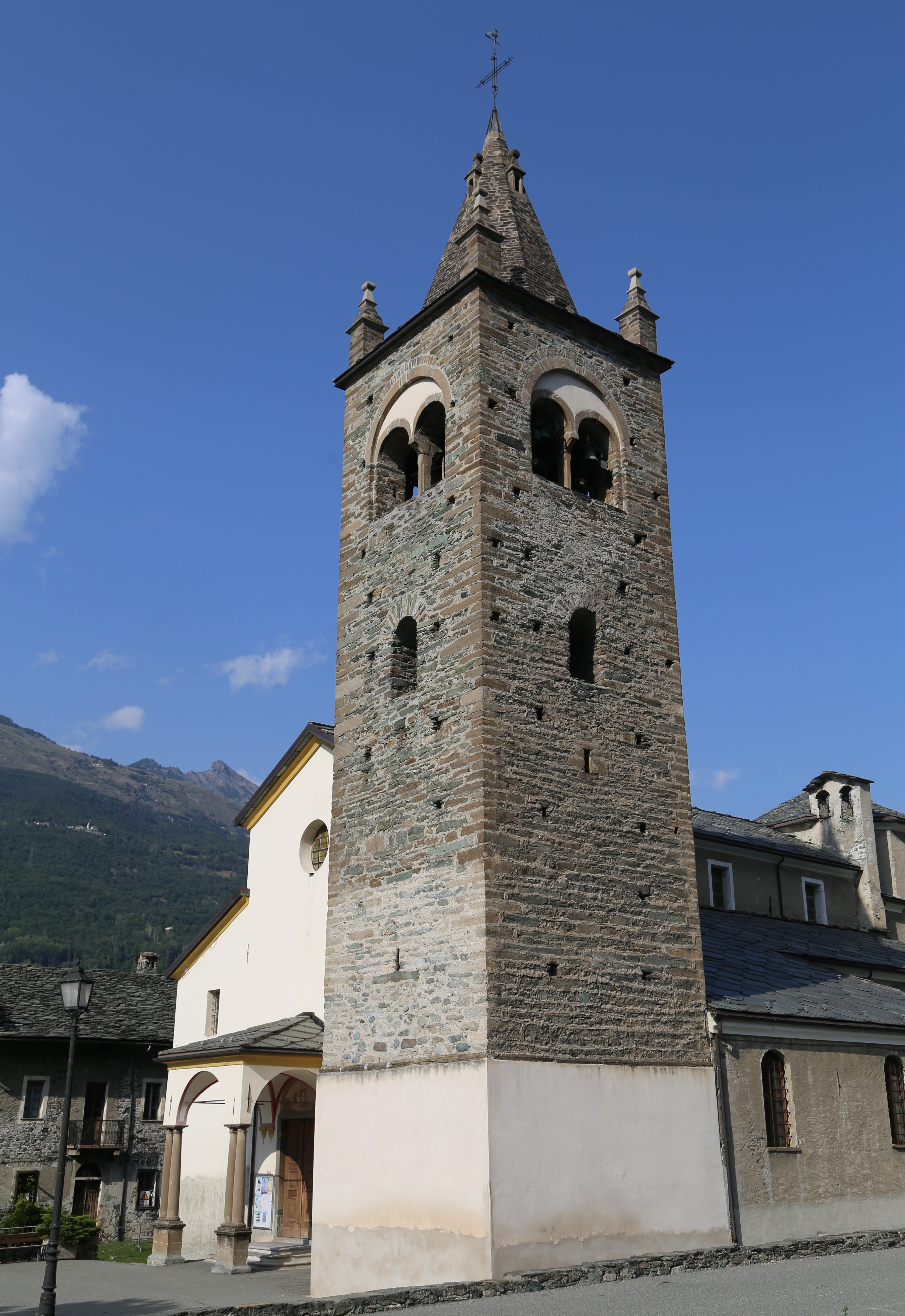 San Maurizio, Fénis, Aostatal